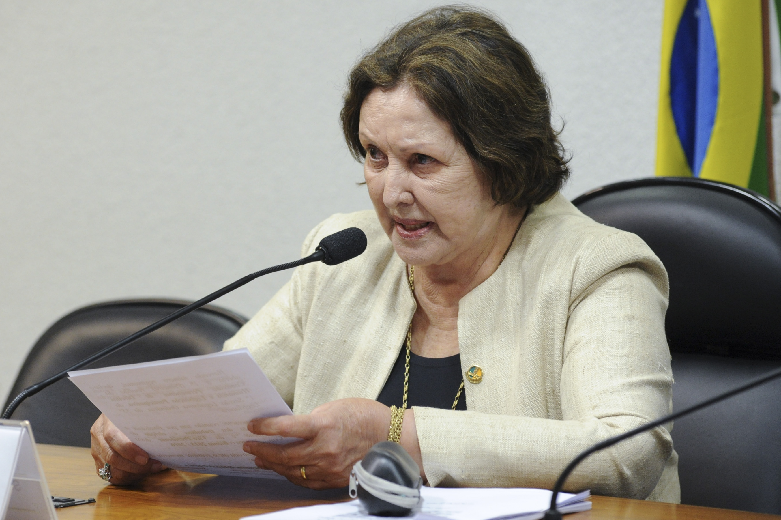 Sala de comissões do Senado Federal durante Instalação dos trabalhos e eleição do presidente e vice-presidente da Comissão de Direitos Humanos e Legislação Participativa (CDH) para o biênio 2015/2016. Em pronunciamento, presidente eventual da CDH, senadora Maria do Carmo Alves (DEM-SE) Foto: Geraldo Magela/Agência Senado